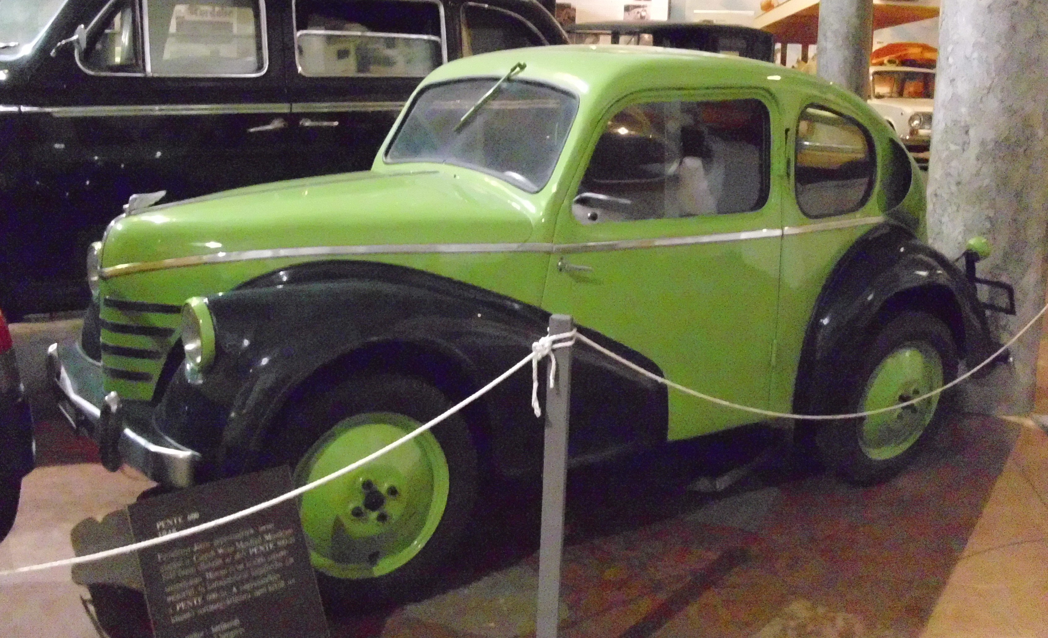 Pente 600 1948 im Transportmuseum Budapest